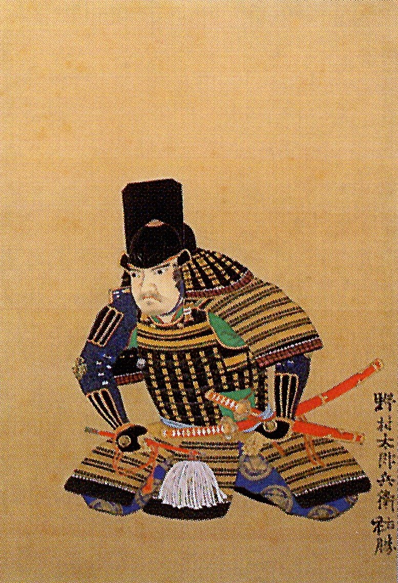 野村祐勝の肖像。